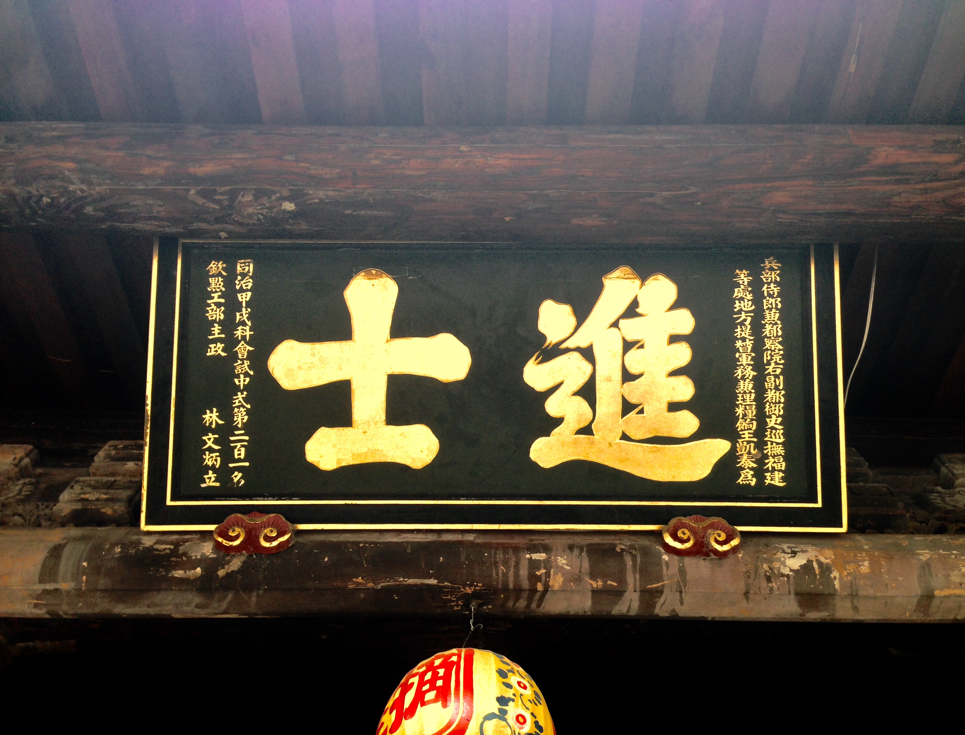 中文（台灣）: 摘星山莊林文炳進士匾